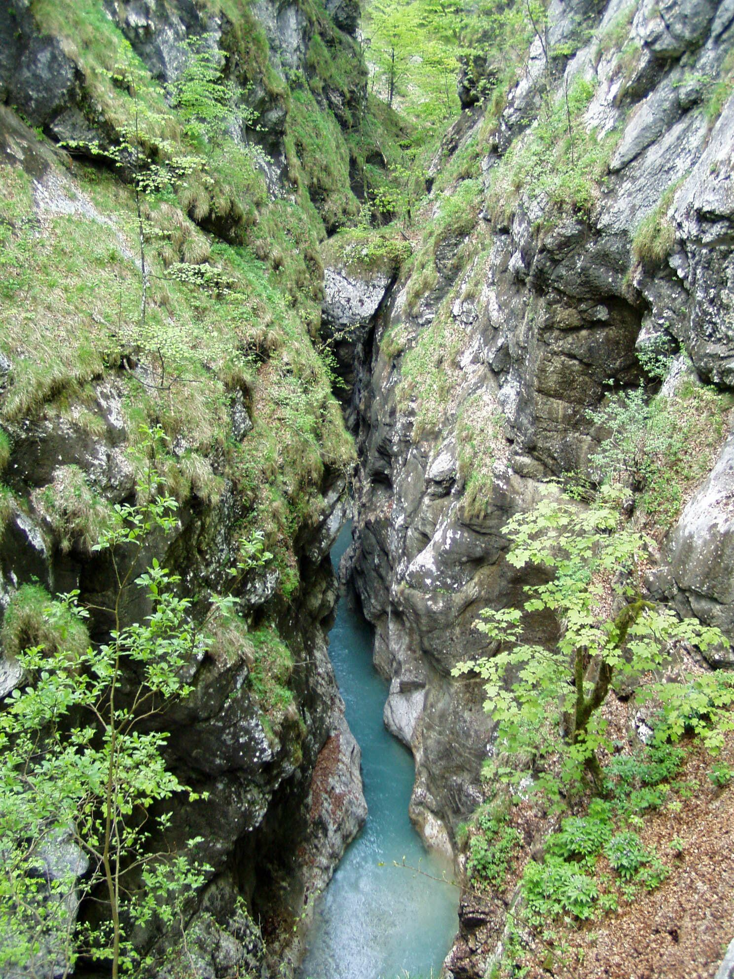 Tscheppaschlucht, Loibltal, Karawanken, Carinthia